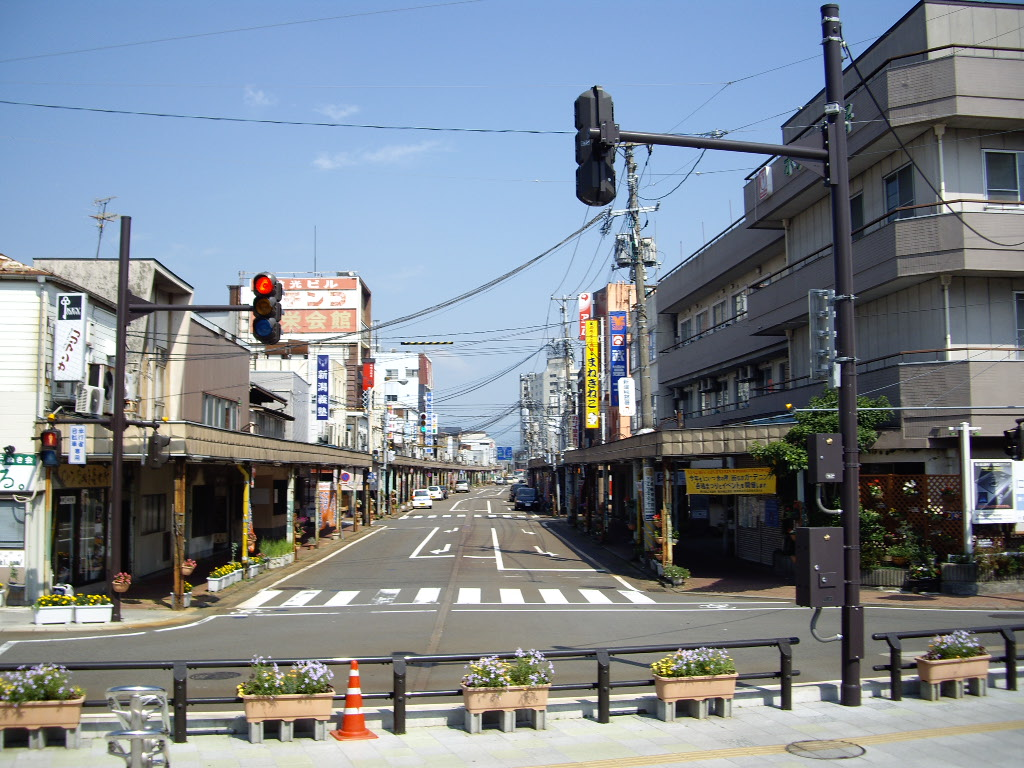 新津駅東口駅前